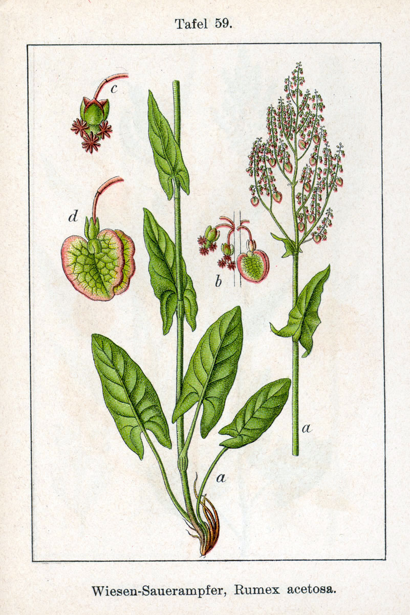 Rumex acetosa L. , nom. cons. prop. Original Description Wiesen-Sauerampfer, Rumex acetosa